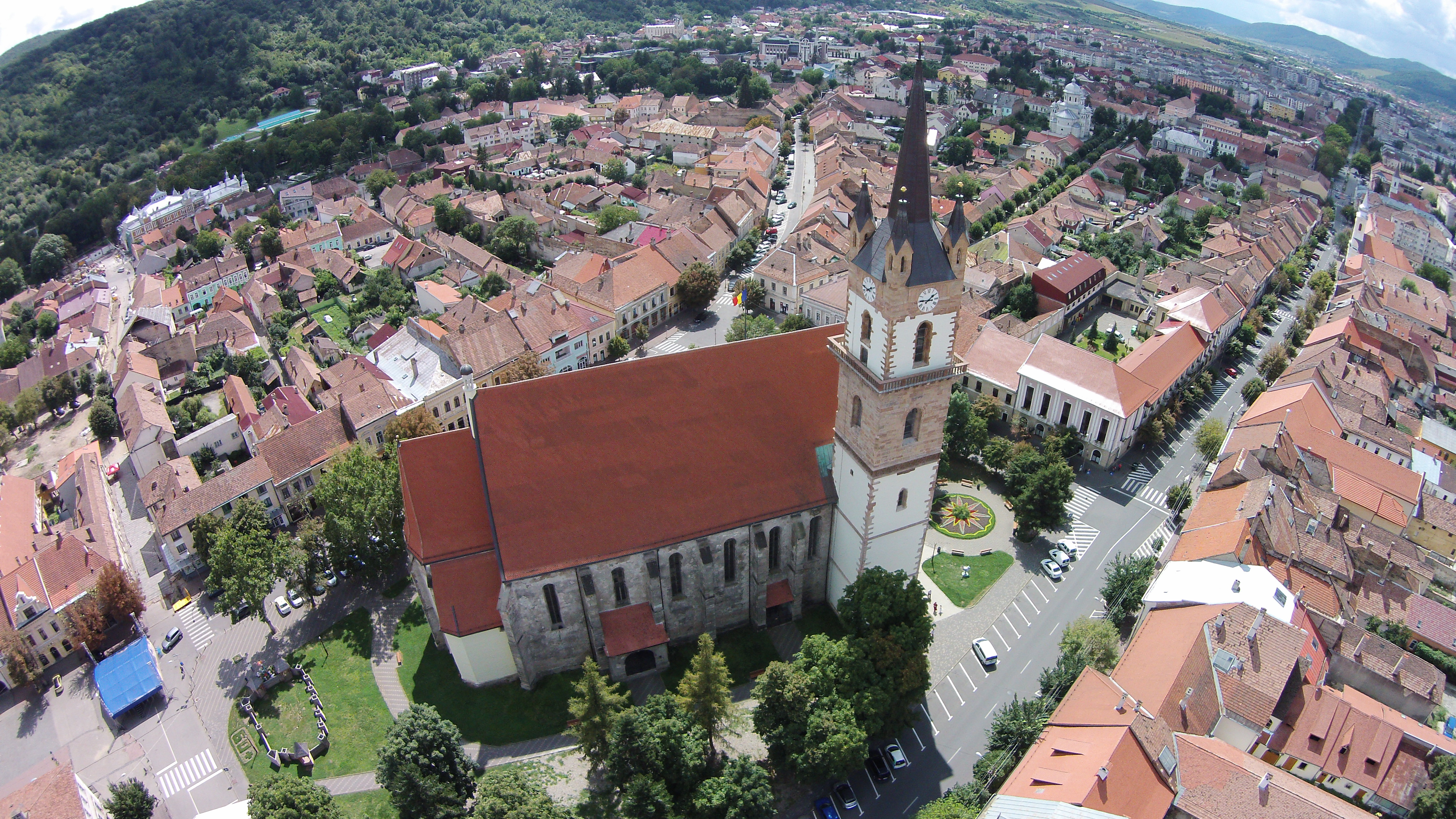 Biserica evanghelică.C.A-vedere aeriana